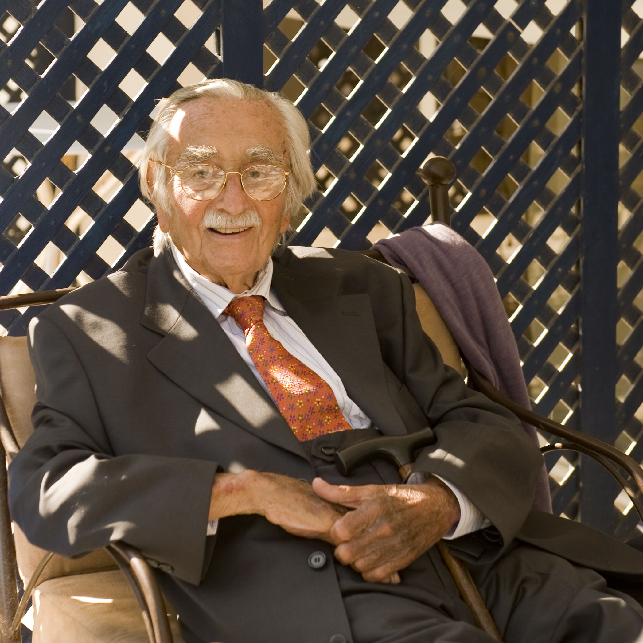 Edmond Amran El Maleh à Asilah pour l'hommage qui lui a été rendu sous la forme d'une salle de conférences portant son nom à l'hôtel Al Khaima. Photo Saâd A. Tazi